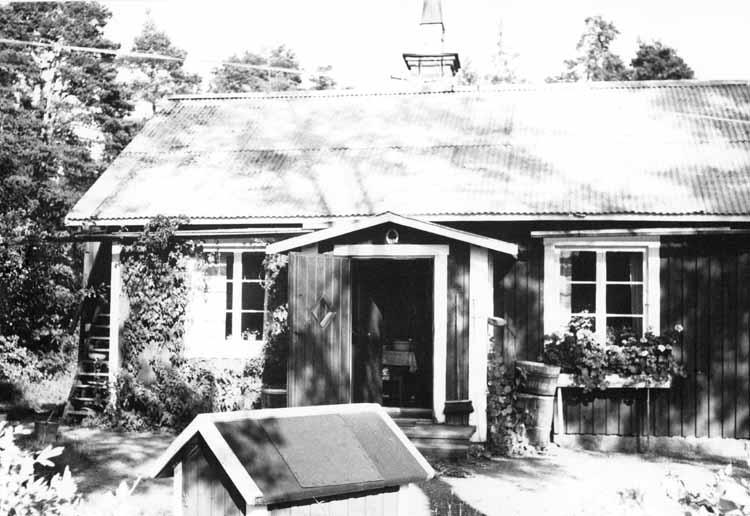 Torpet Råsten, Viksjö, Järfälla. Torpet låg under Viksjö gård och var beläget cirka 1,5 km väster om Viksjö gård, ungefär 1 km nordöst om skäftingebroarna, precis vid gränsen (rågången) mot Görväln. Det byggdes på 1820-talet och revs år 1970.